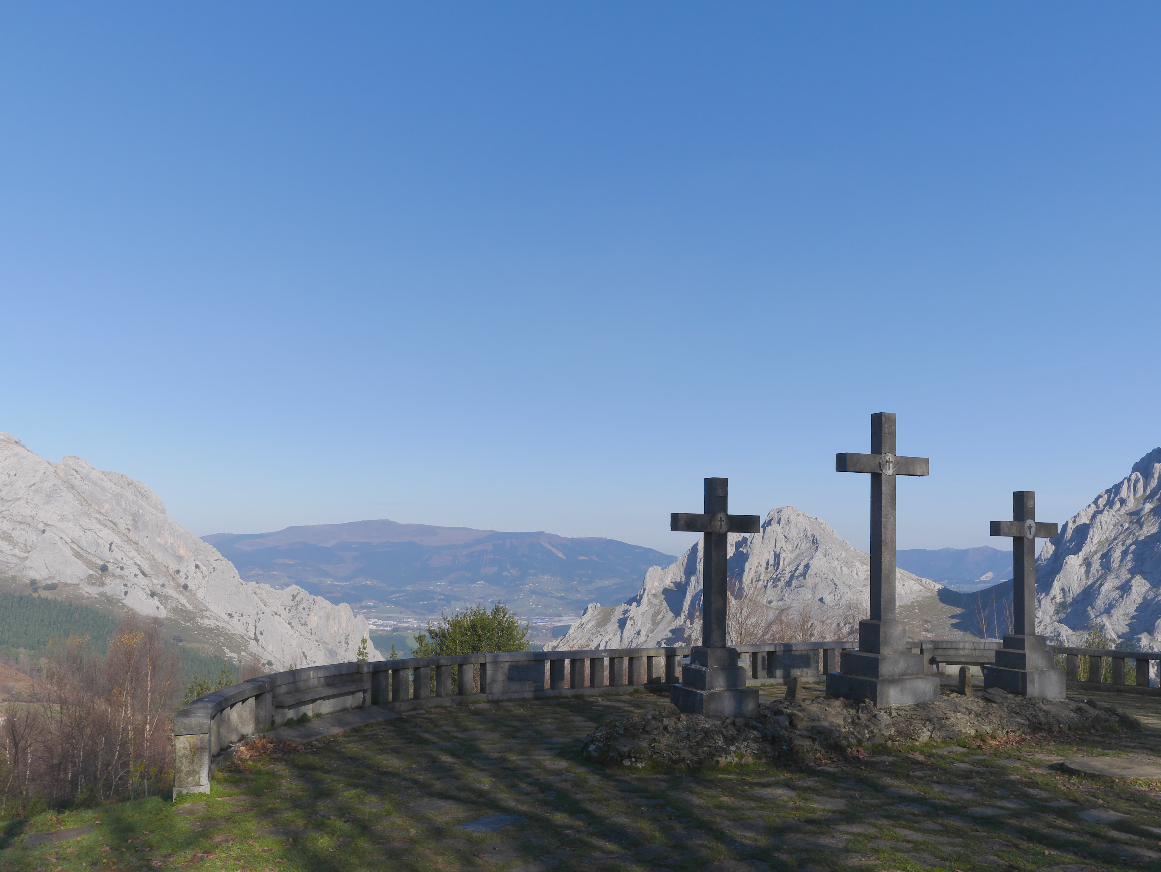 Mirador de Urkiola, vistas en dirección Durango. Vizcaya, País Vasco, España